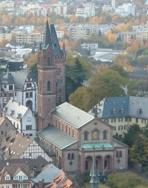 St.-Laurentius-Kirche in Weinheim, ganz unten im Bild das Kaiser- und Kriegerdenkmal für die Gefallenen der Einigungskriege